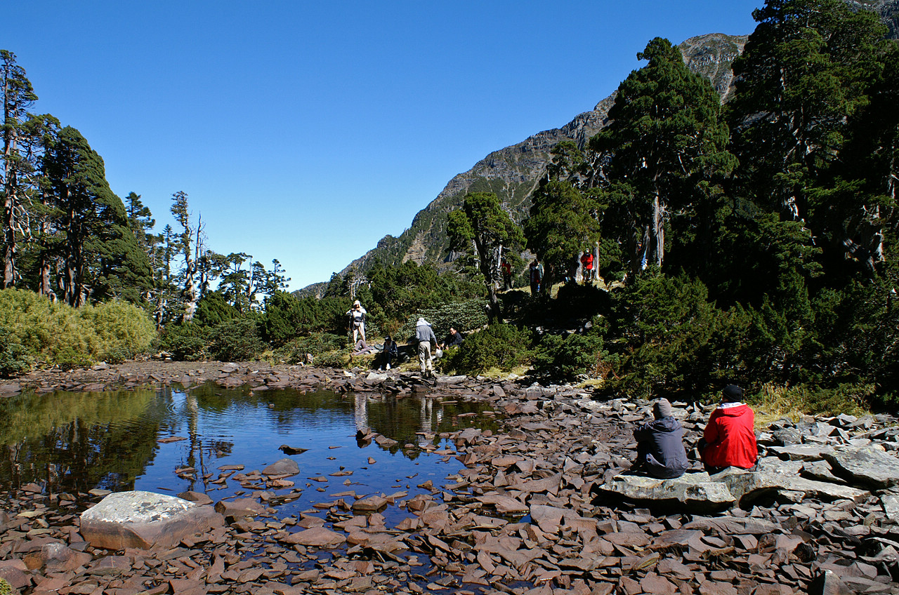 枯水期的翠池 The Green Jade Pond at low water level.